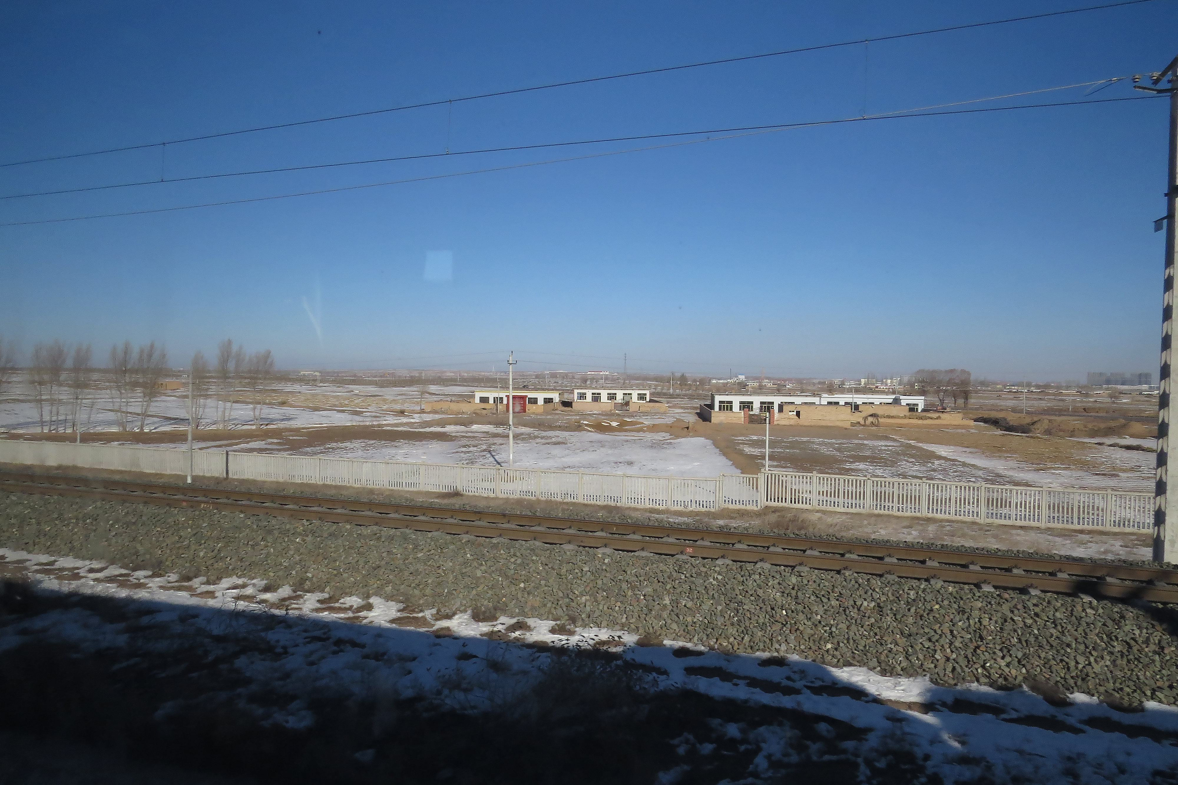 太中银铁路定银支线（定边端）